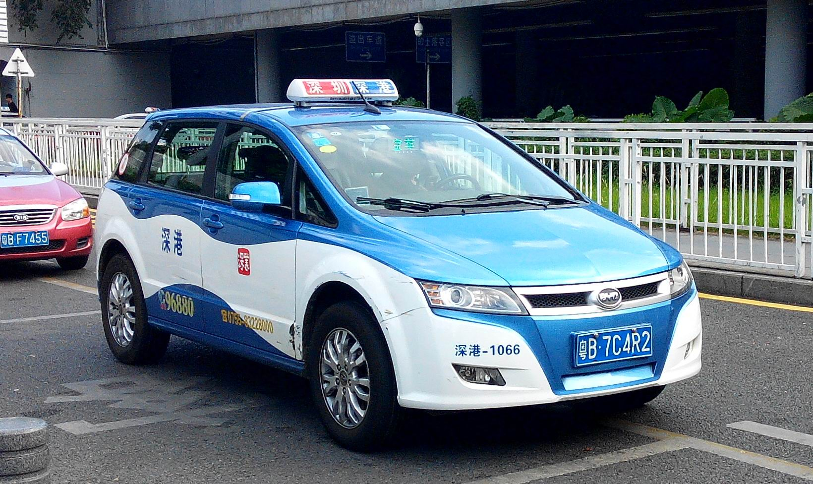 深圳电动的士 比亚迪